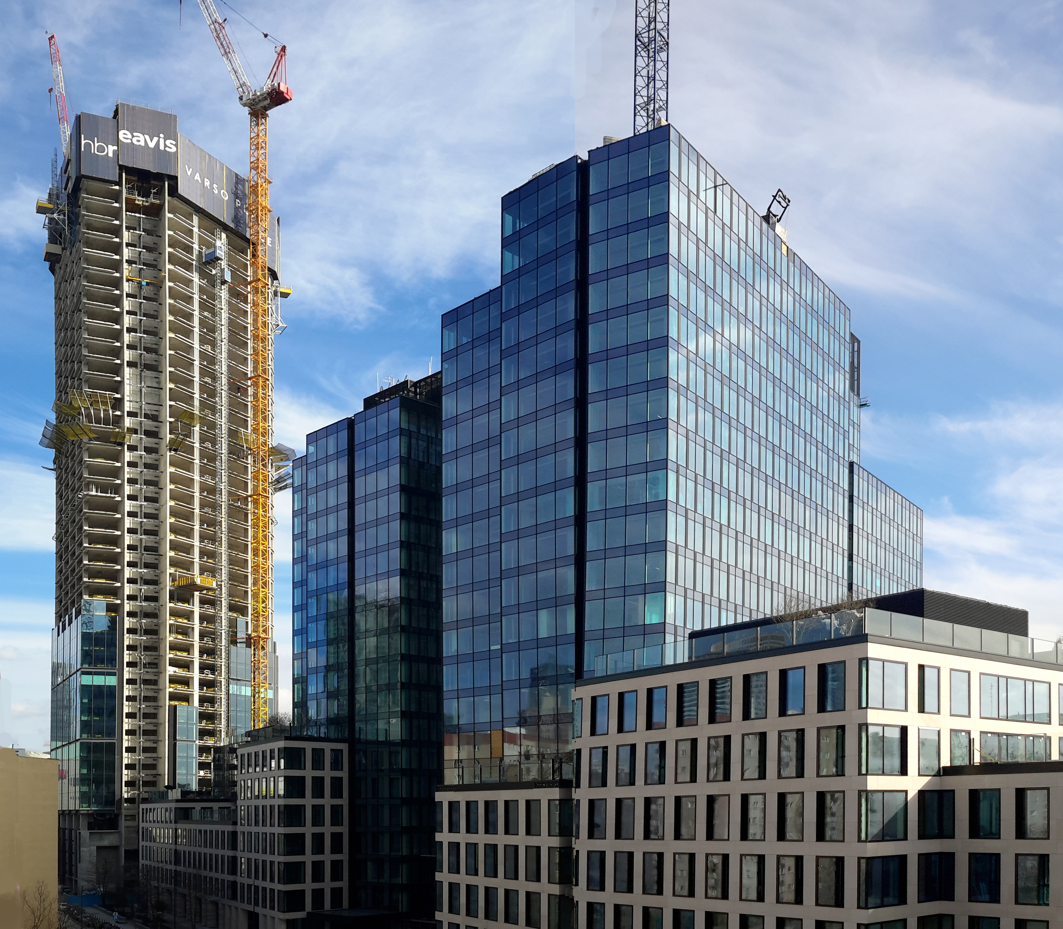 Plac budowwy Varso 1 marca 2020